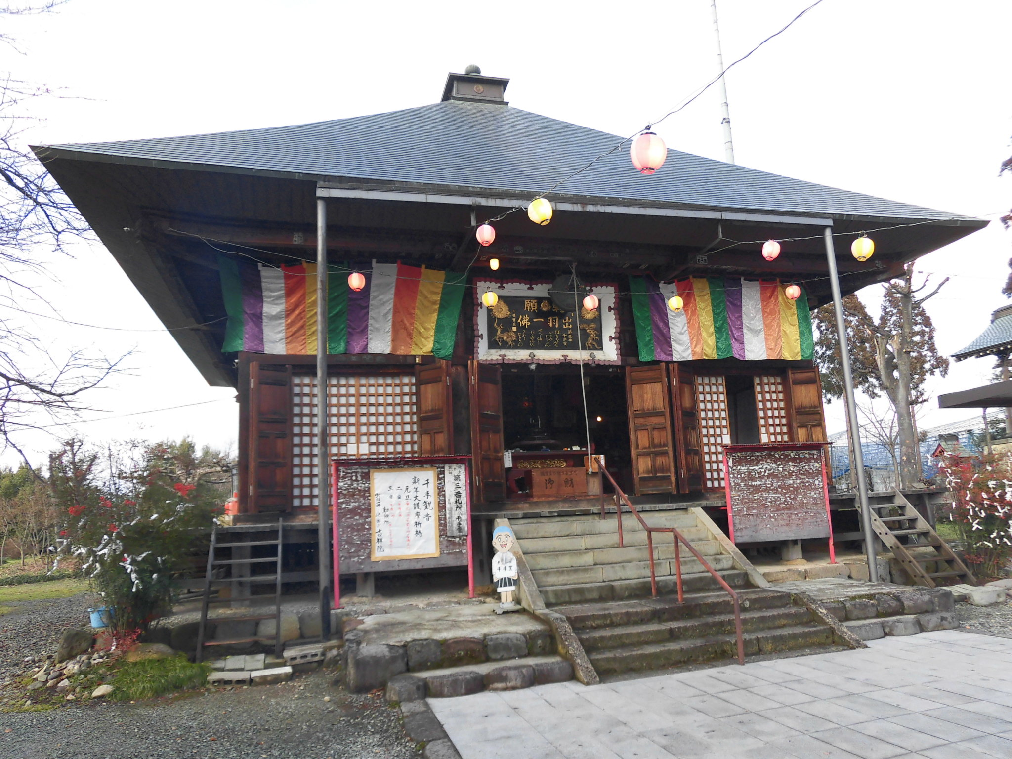 吉祥院（きちじょういん）の観音堂。山形県山形市千手堂に所在。 最上三十三観音第三番札所。 現在の建物は室町時代の応永年間（1394～1427）に再建され、その後幾度か修理されたもの。 山形市指定有形文化財。